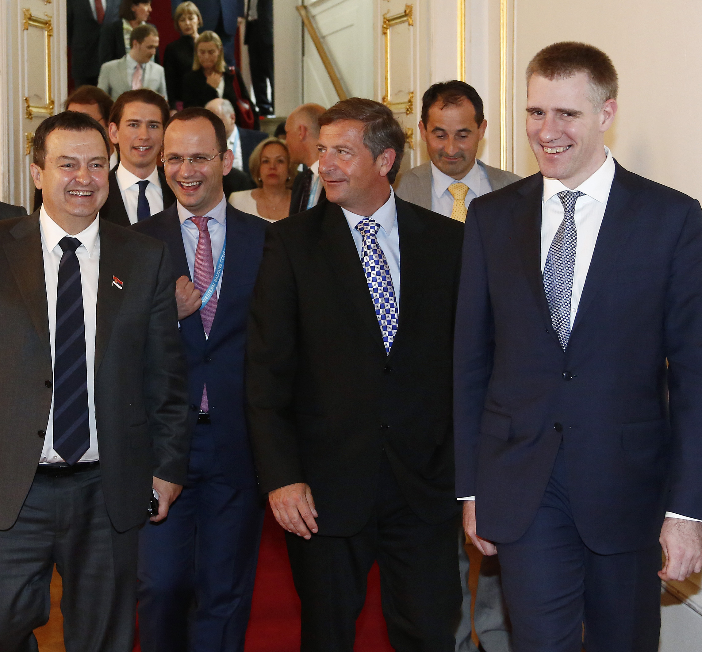 Westbalkankonferenz. v.l.n.r. Ivica Dacic, Sebastian Kurz, Ditmir Bushati, Karl Erjavec, Igor Luksic. Wien, 03.06.2014, Foto: Dragan Tatic